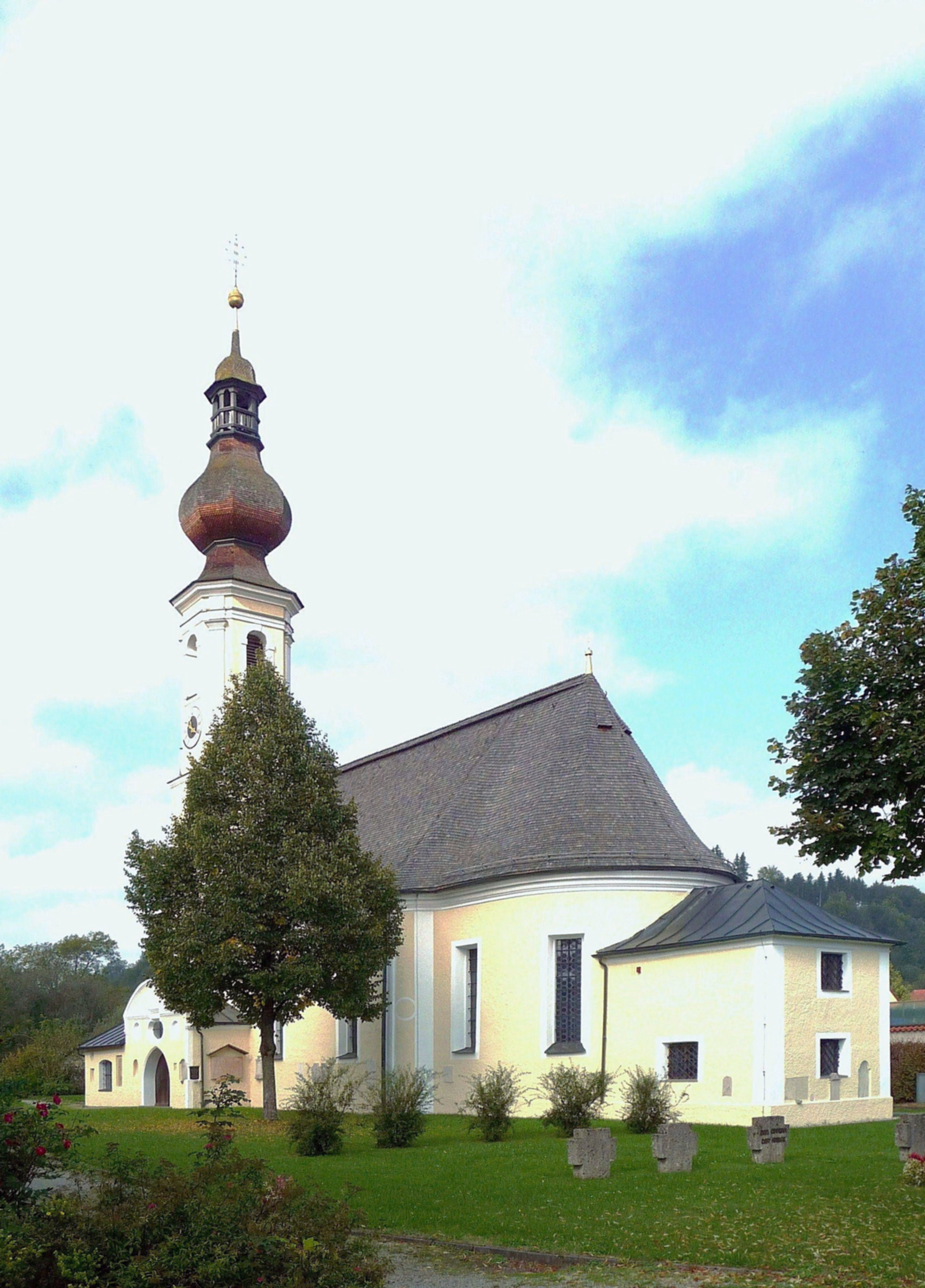 Die Kirche St. Ägigius in Altenmarkt an der Alz